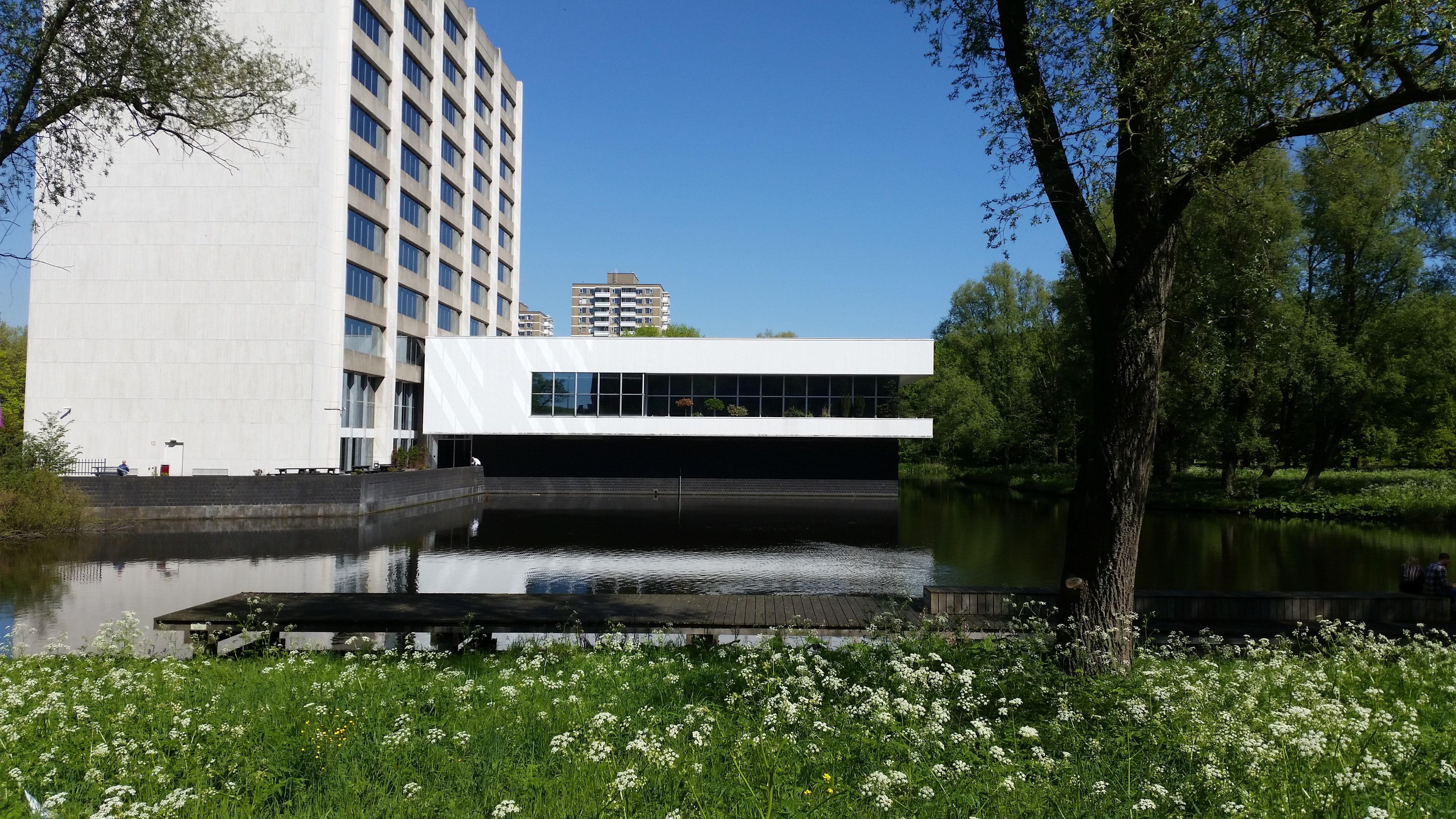 Kantorencentrum Ringpark, Nachtwachtlaan, Amsterdam, zijgevel en eetzaal